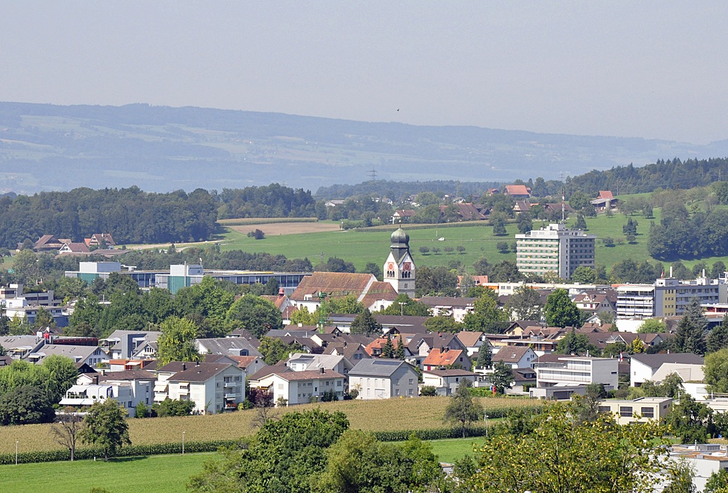 Blick auf Baar